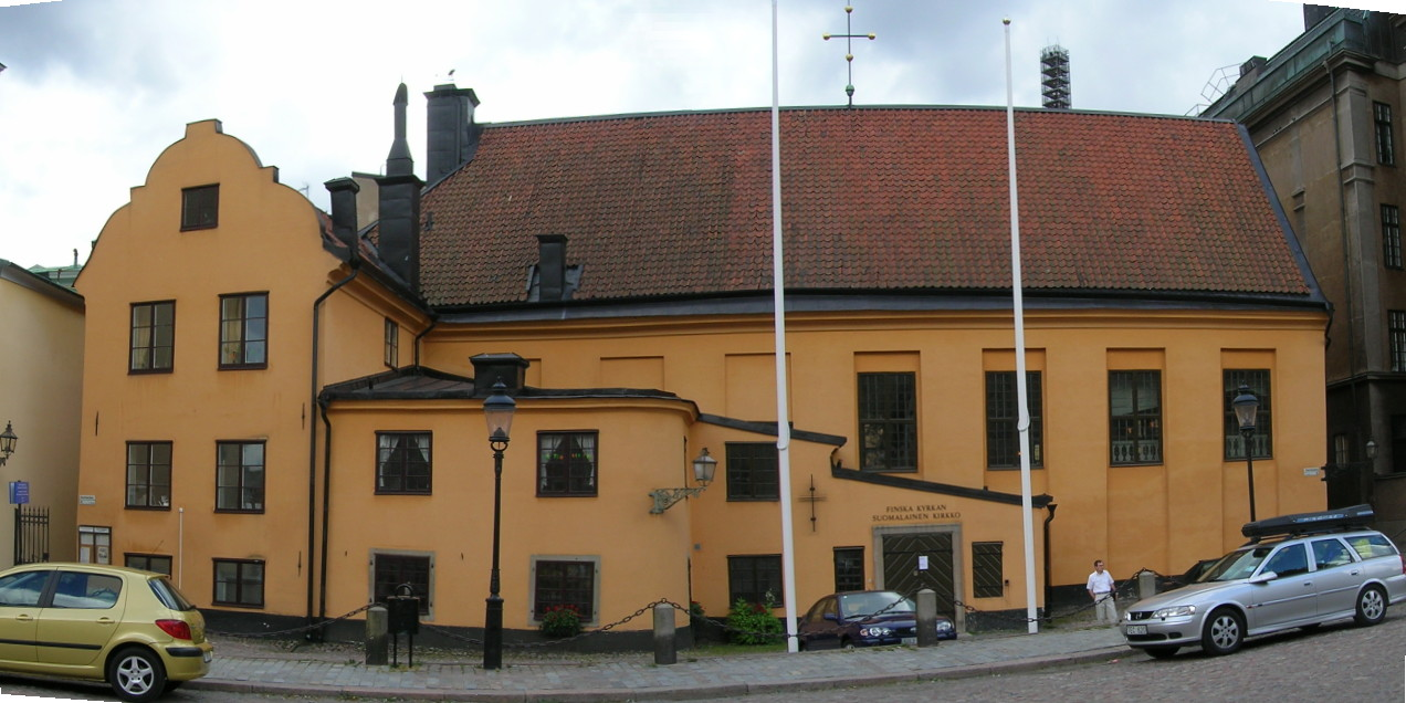 Finska kyrkan/Fredriks kyrka, Gamla Stan, Stockholm, Sweden.